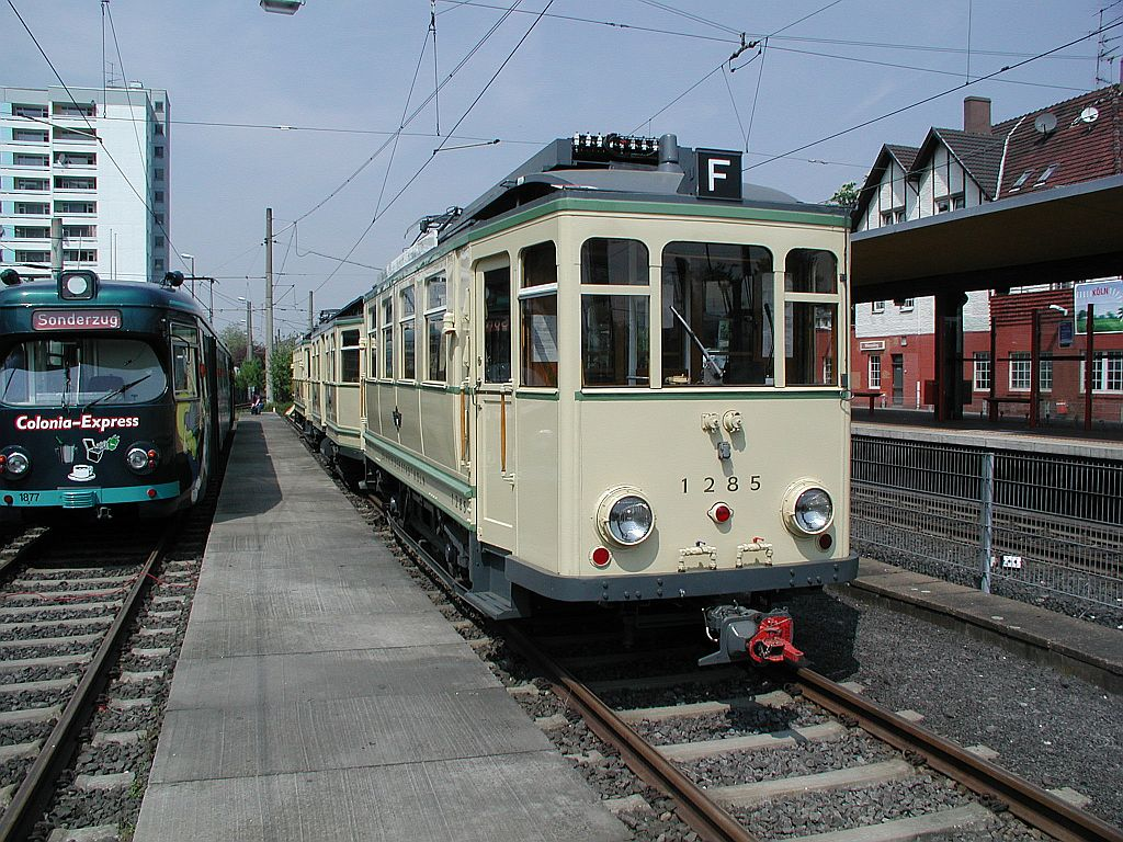 KVB Tw 1285 "Finchen" in Wesseling